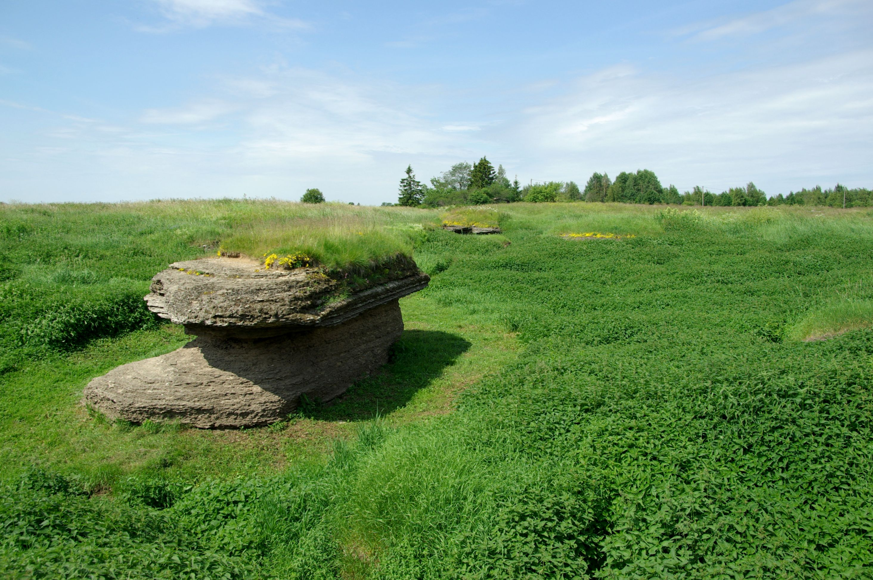 Kostivere Kivilaud (seen) 2,8 m kõrgune jäänukpangas.Seen asub Kostivere lookarstialal Kostivere alevikus, Jõelähtme vallas, Harju maakonnas